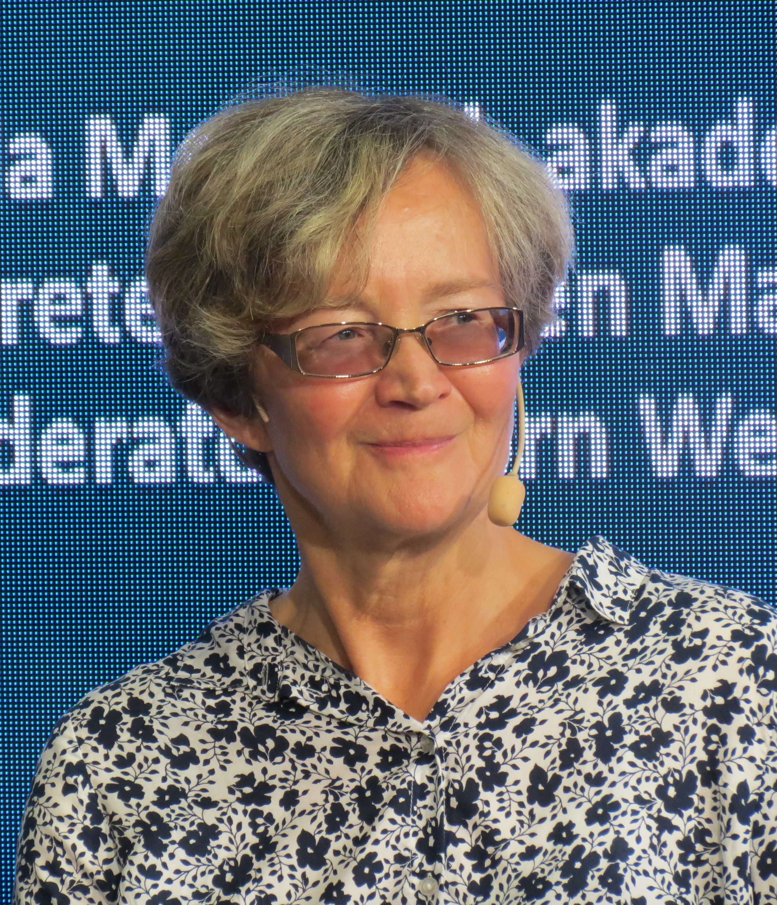 Ellen Mattson i GöteborgsPostens monter på Bokmässsan i Göteborg 2019.